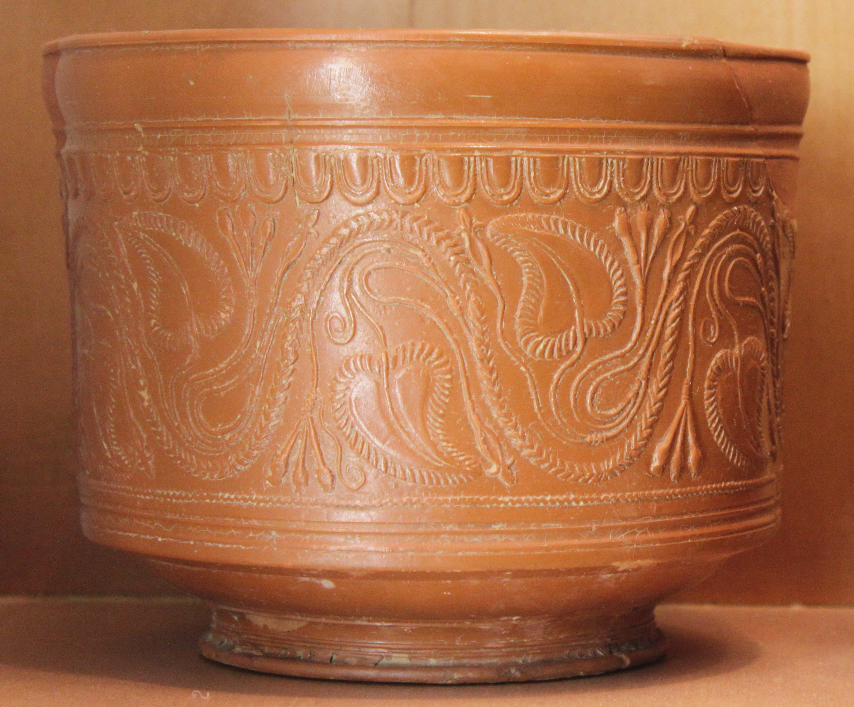 Céramique sigillée de La Graufesenque, conservée au musée Fenaille, Rodez